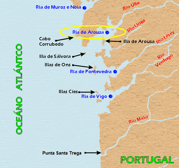 Rías de Galicia, Ría de Arousa Publish by= Luis Miguel Bugallo Sánchez.